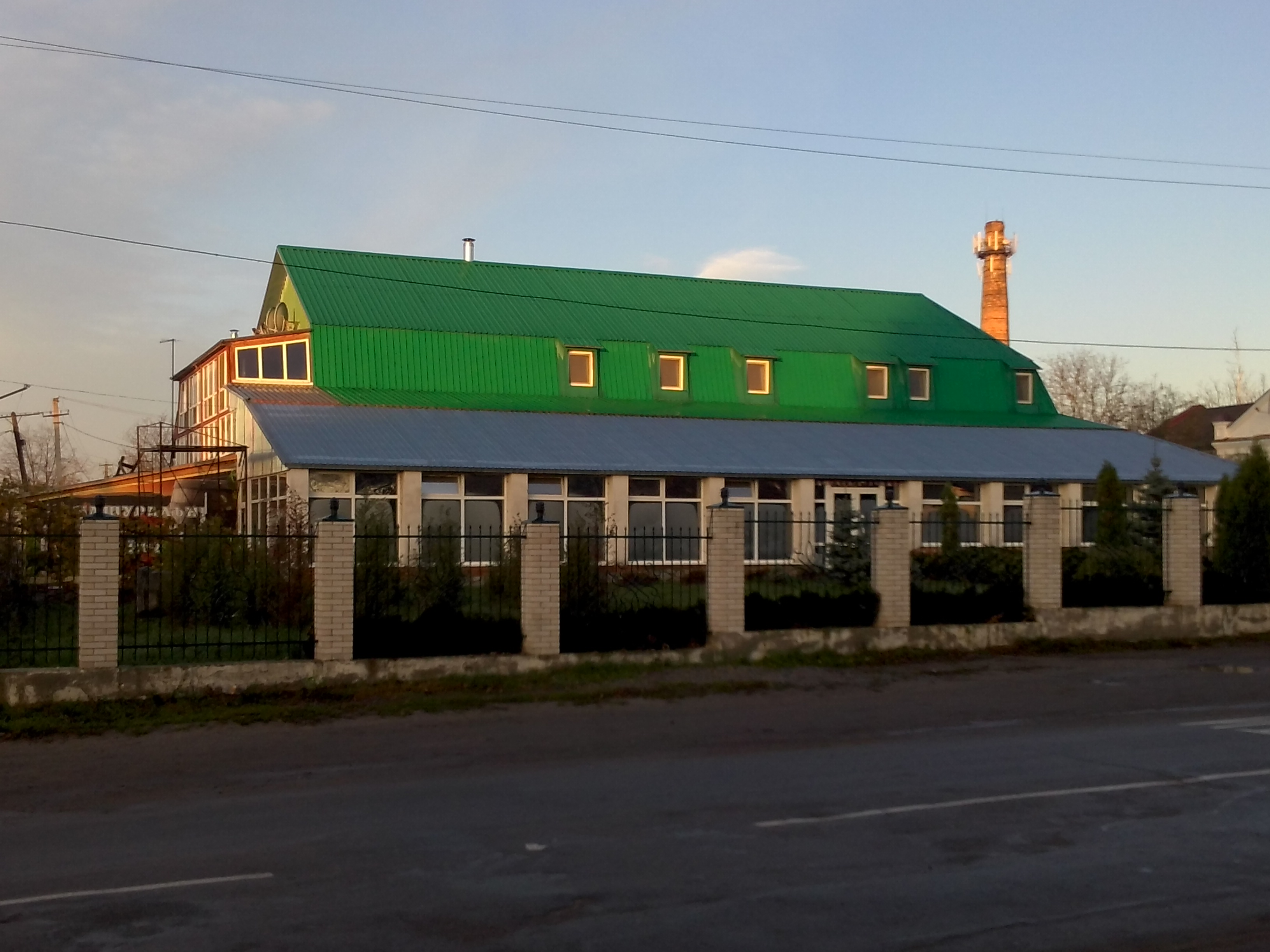 Готель у смт Турбів